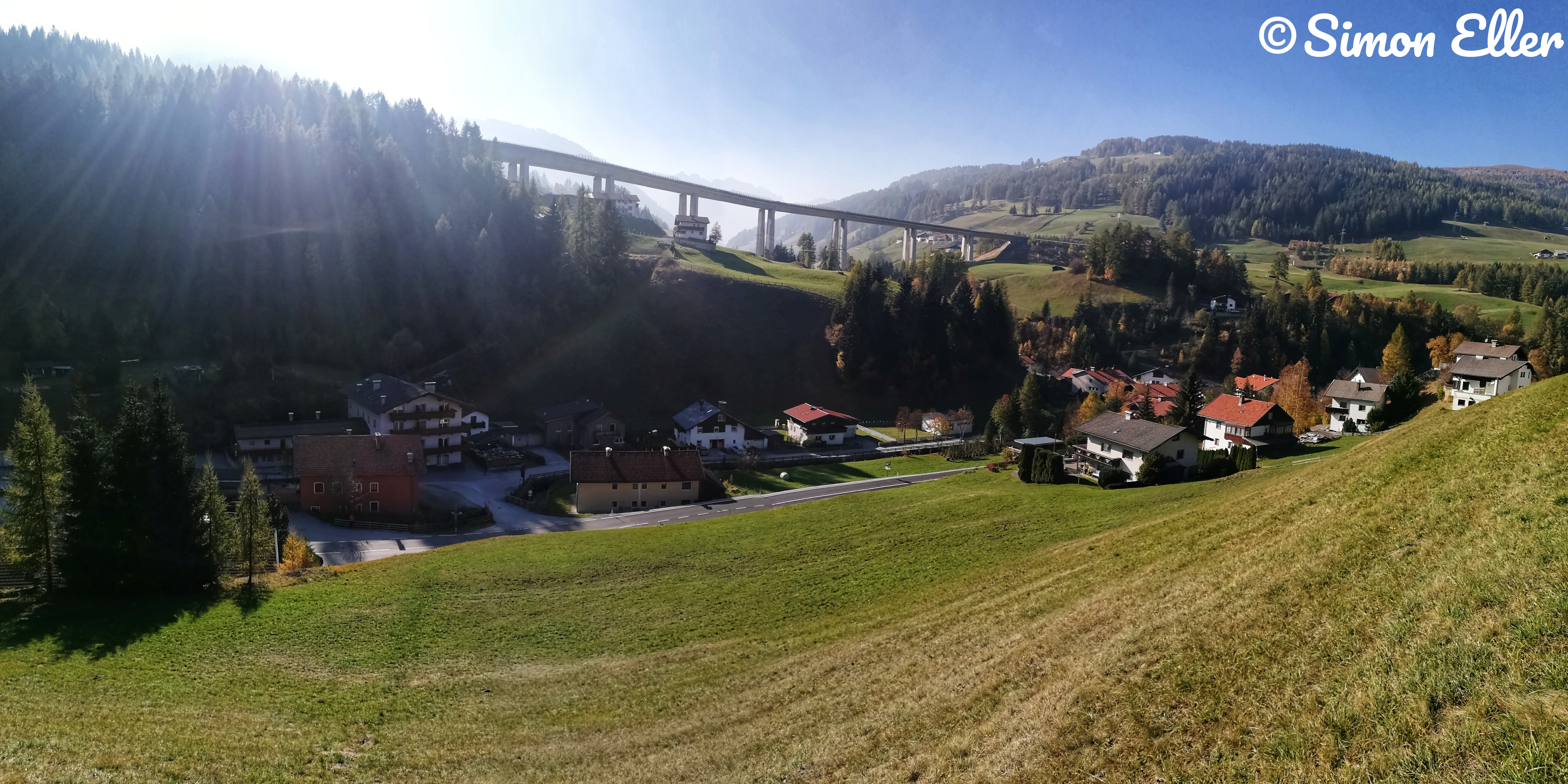 Hier sehen Sie Gries am Brenner, gelegen im Nordtiroler Wipptal. Das Foto wurde im Herbst 2018 gemacht.